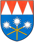 Znak Říkovic.